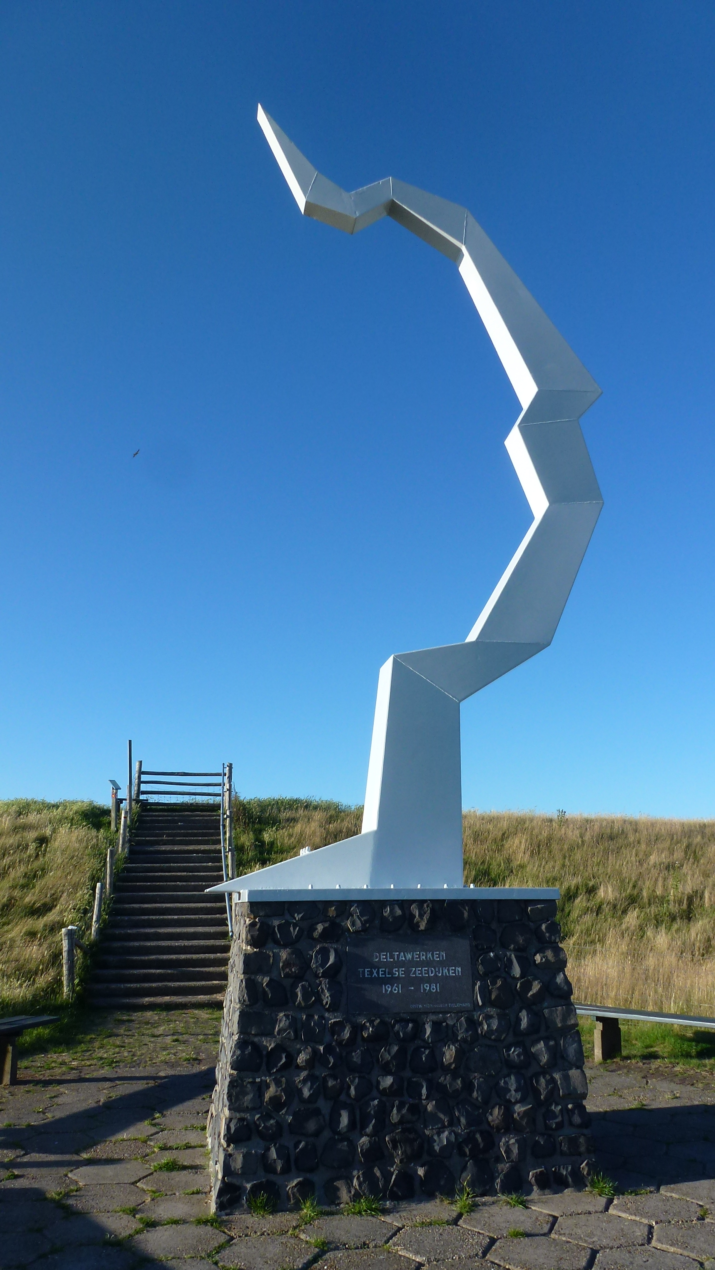 De Schicht is een sculptuur in staal op een sokkel van basaltsteen, ter herinnering aan de omgekomen Texelse mannen tijden de watersnoodramp in 1953 en symboliseert ook de vormen van de opgehoogde dijken van de Texelse kust aan de waddenzeekant.